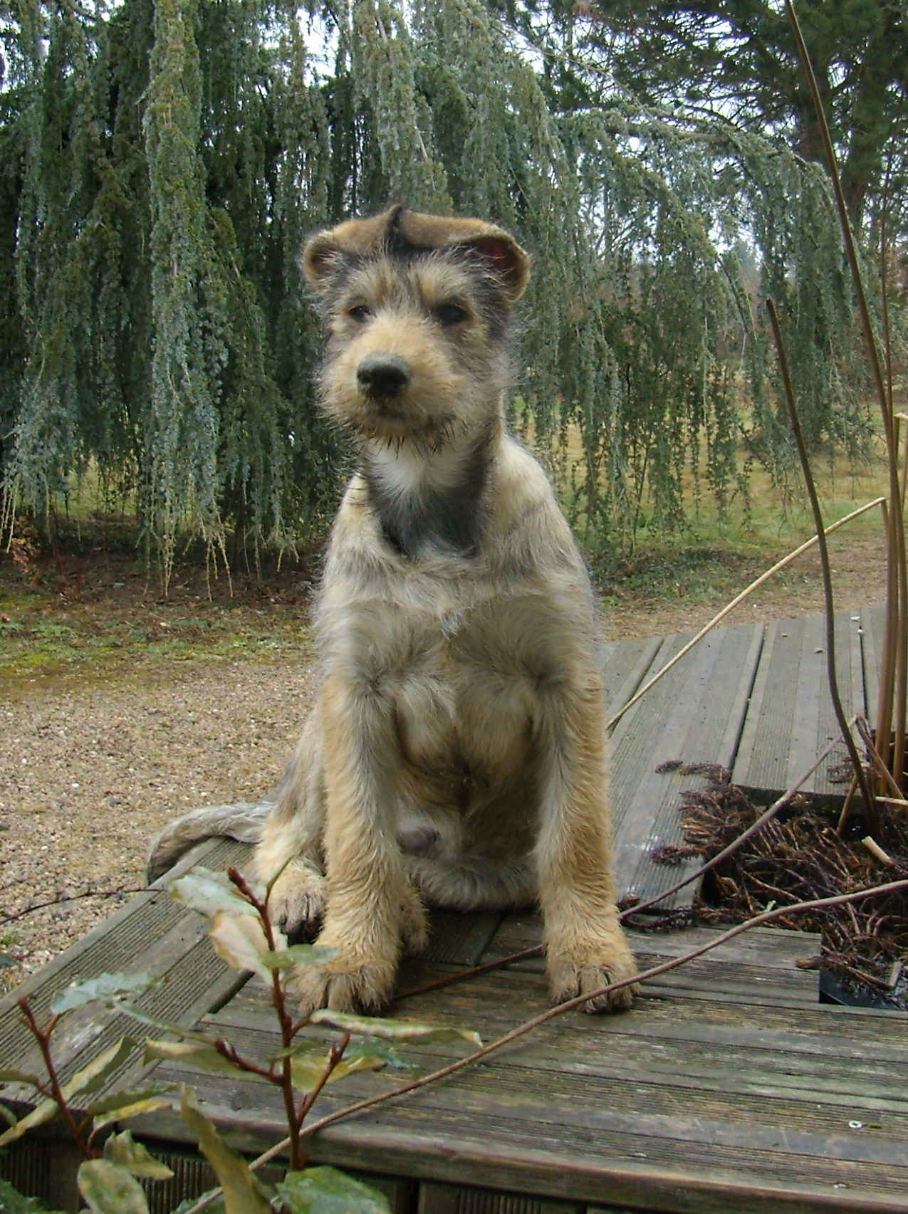 Chiot Berger Picard femelle 3 mois.